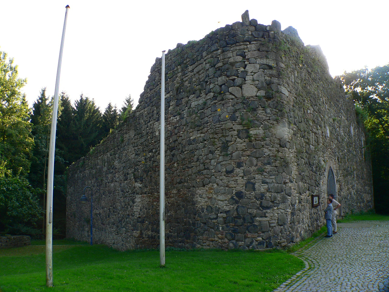 Burgruine Sichelnstein, Gemeinde Staufenberg, Niedersachsen, Germany